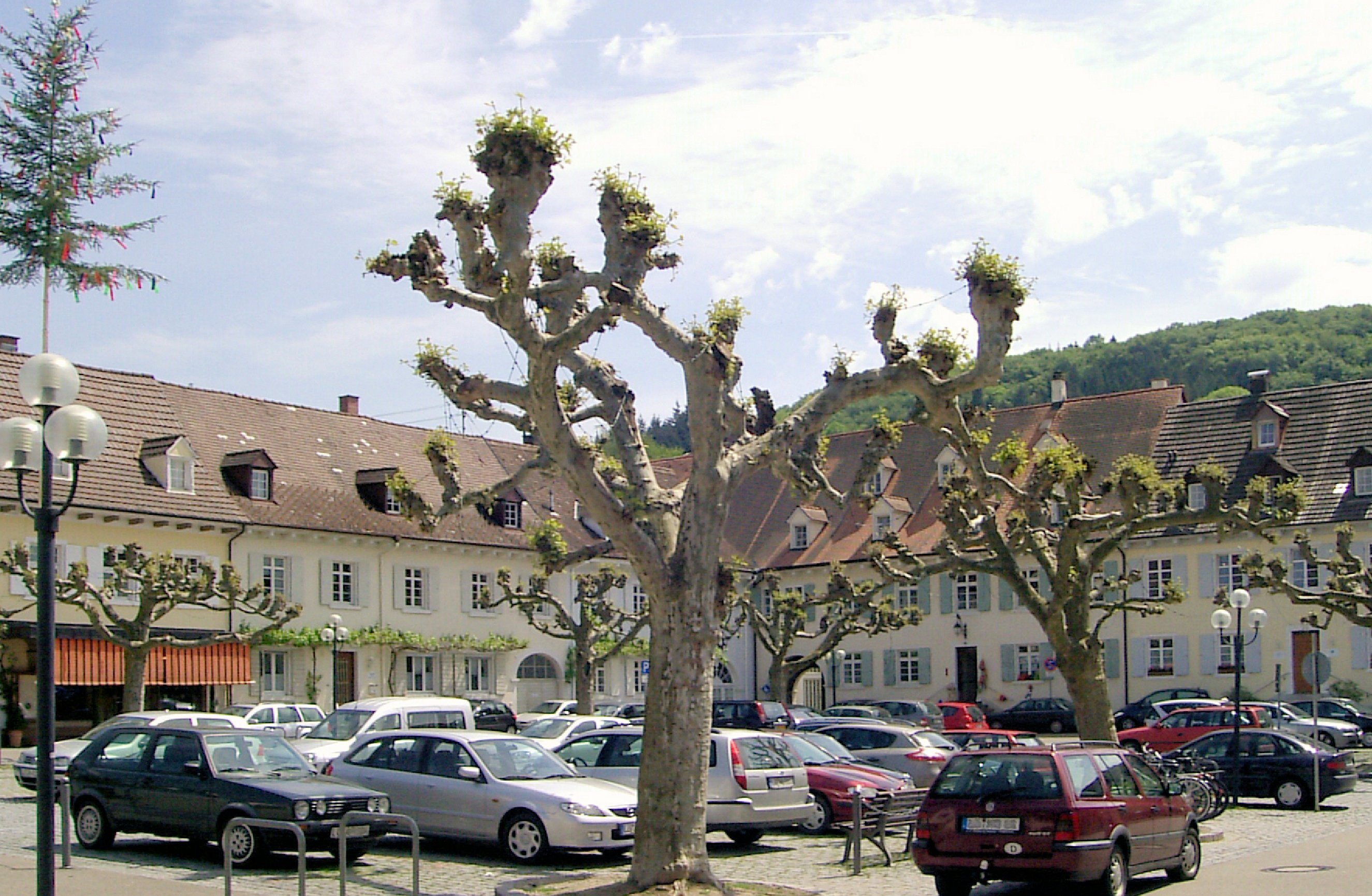 Kandern, Blumenplatz, Baden-Württemberg, Deutschland